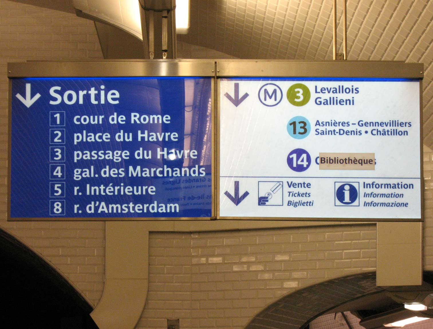 Signalétique du Métro de Paris, Station Saint-Lazare (ligne 12), Paris, France